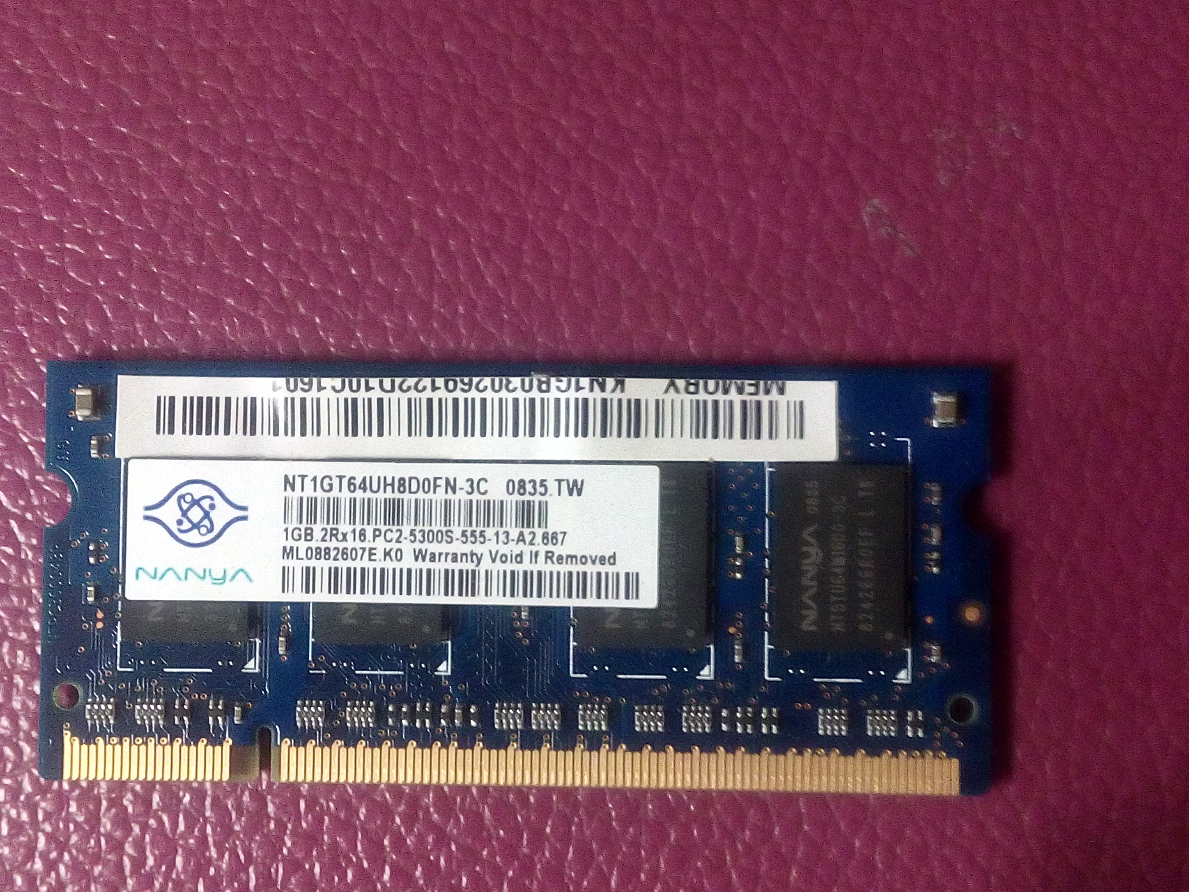 中文（台灣）: 南亞科技DDR2 SO-DIMM記憶體模組NT1GT64UH8D0FN-3C。